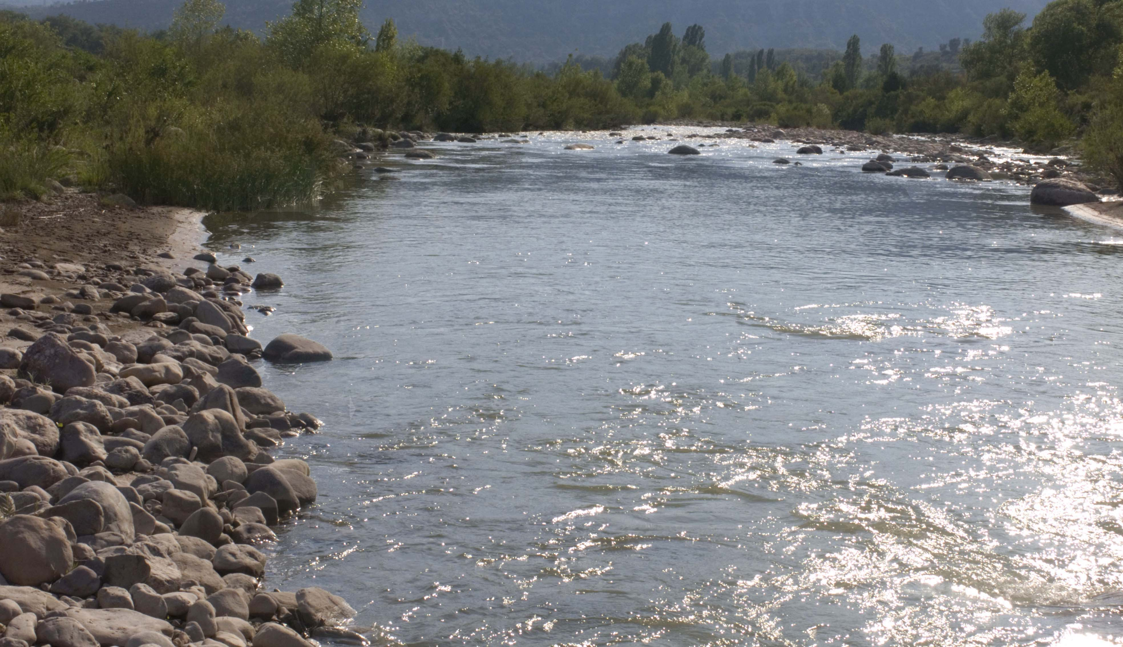 Curs mitjà. Entre Serradui i la Pobla de Roda, a la Ribagorça aragonesa.